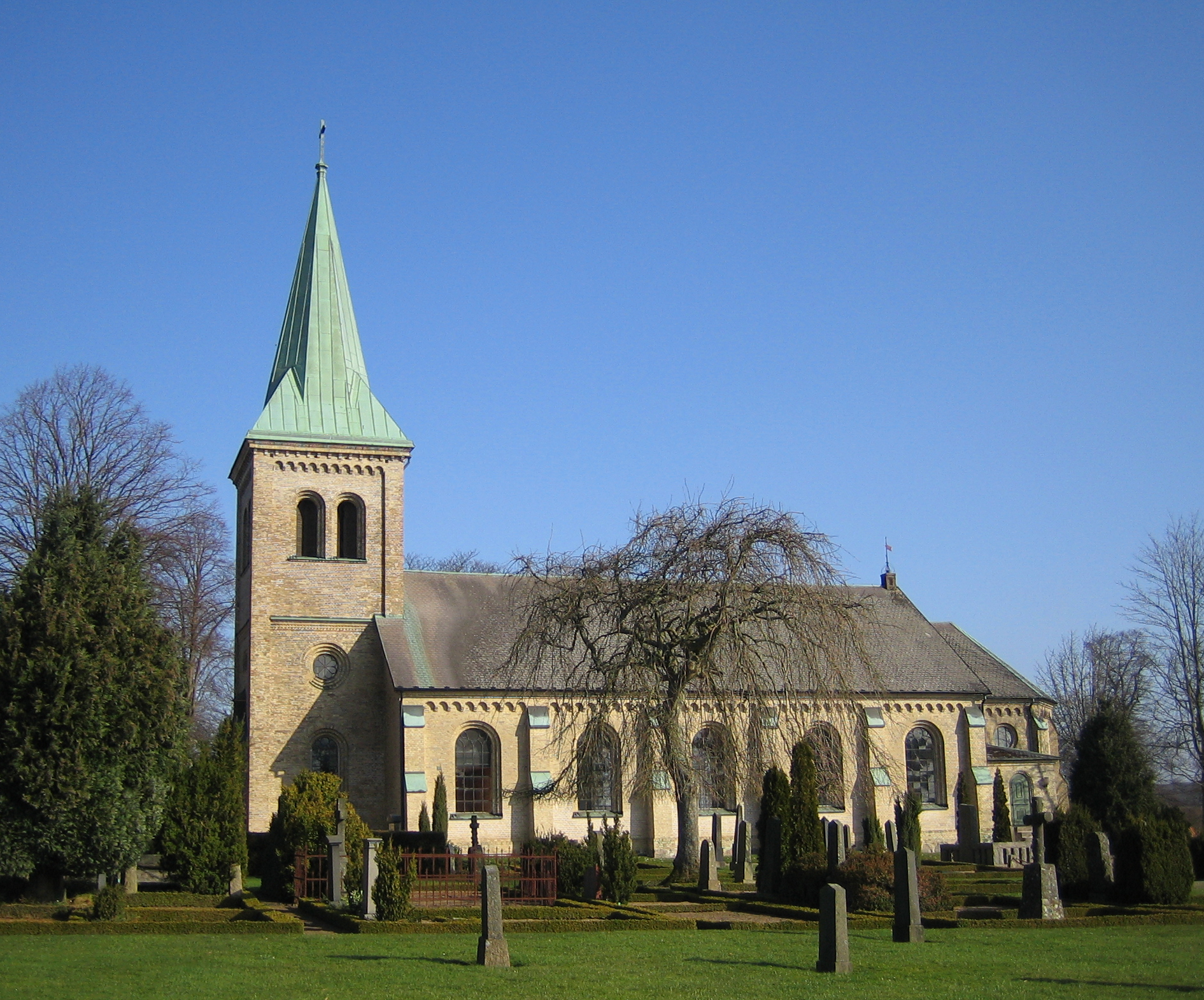 Svalövs kyrka in Skåne, Sweden